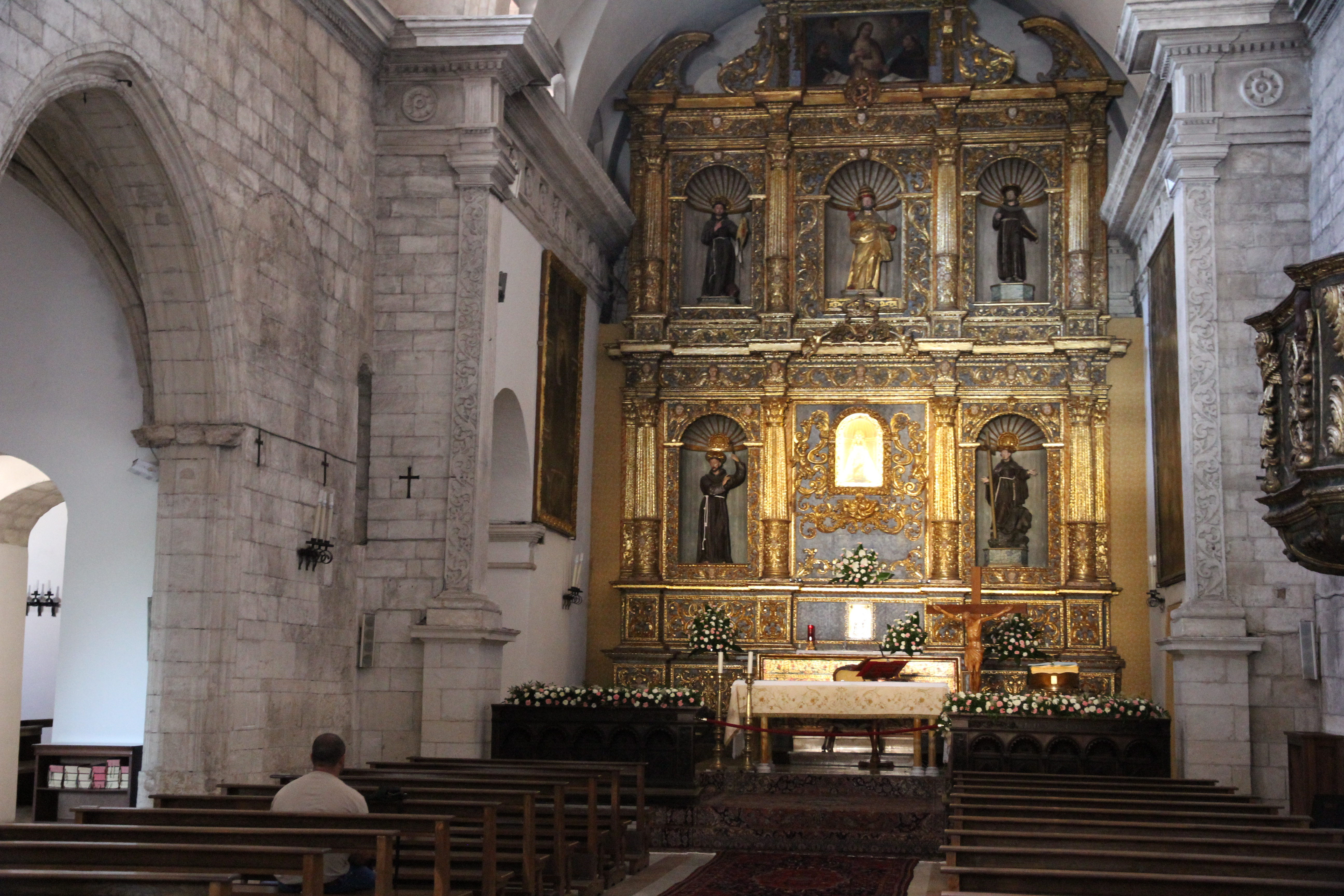 Sassari - Chiesa di San Pietro di Silki